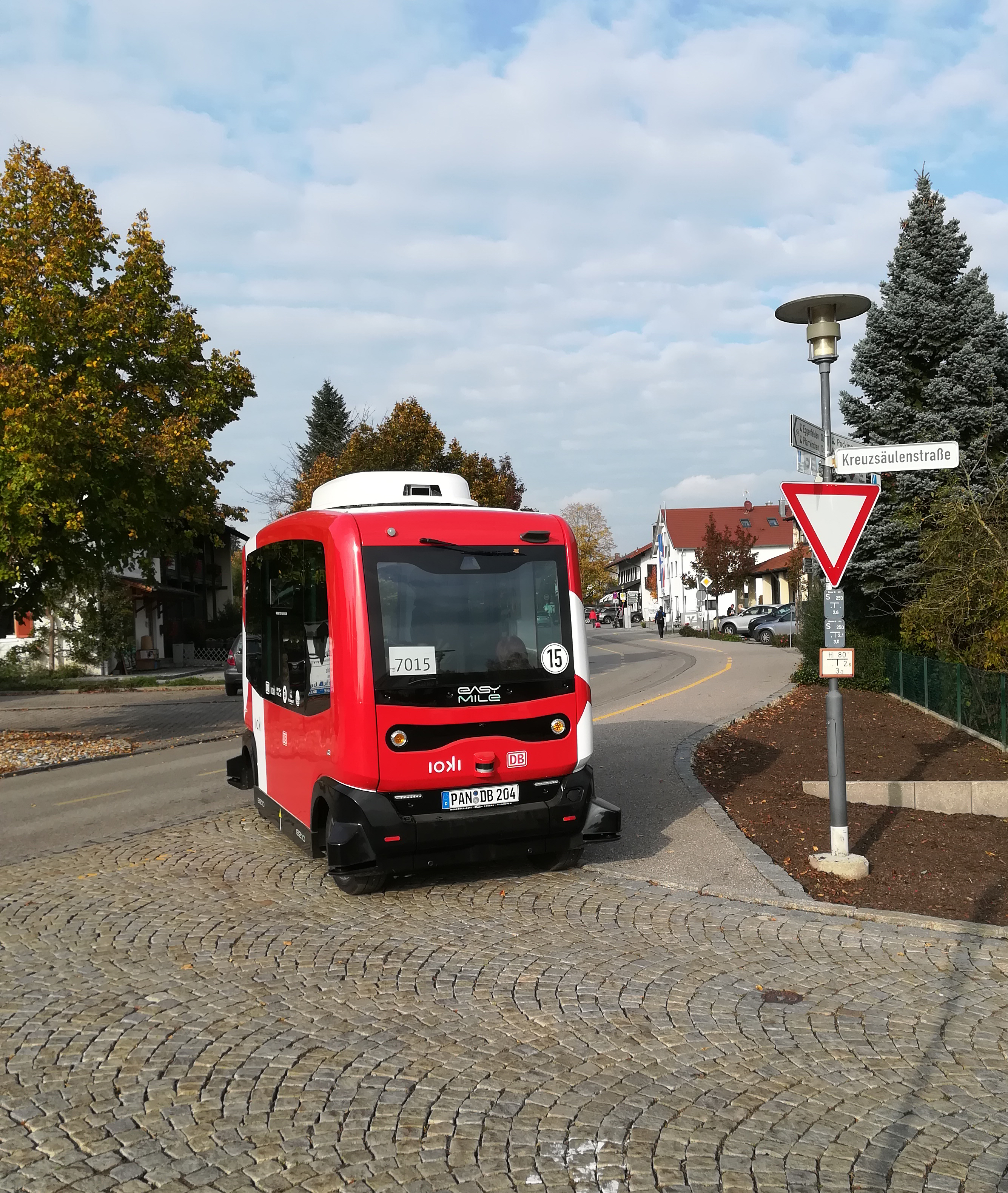 Autonomer Bus Bad Birnbach, 2. Gebneration